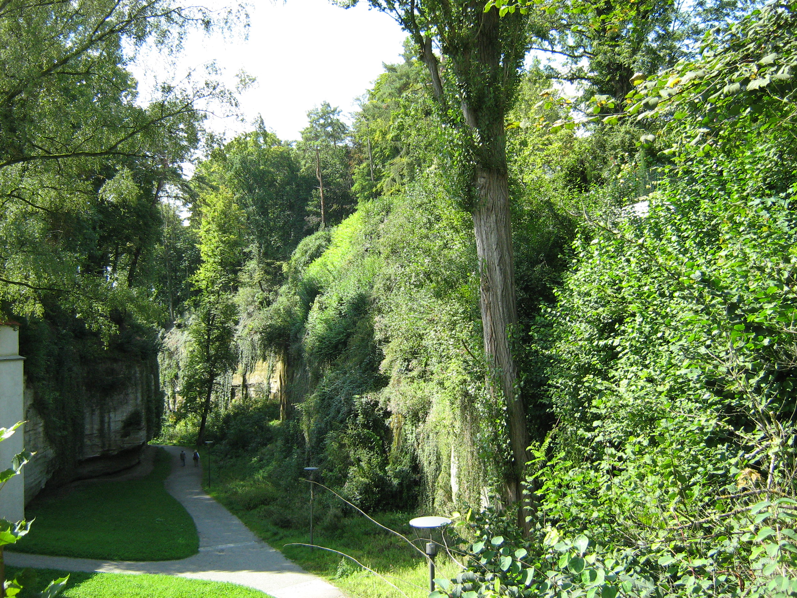 Stadtgraben in Überlingen am Bodensee 2007